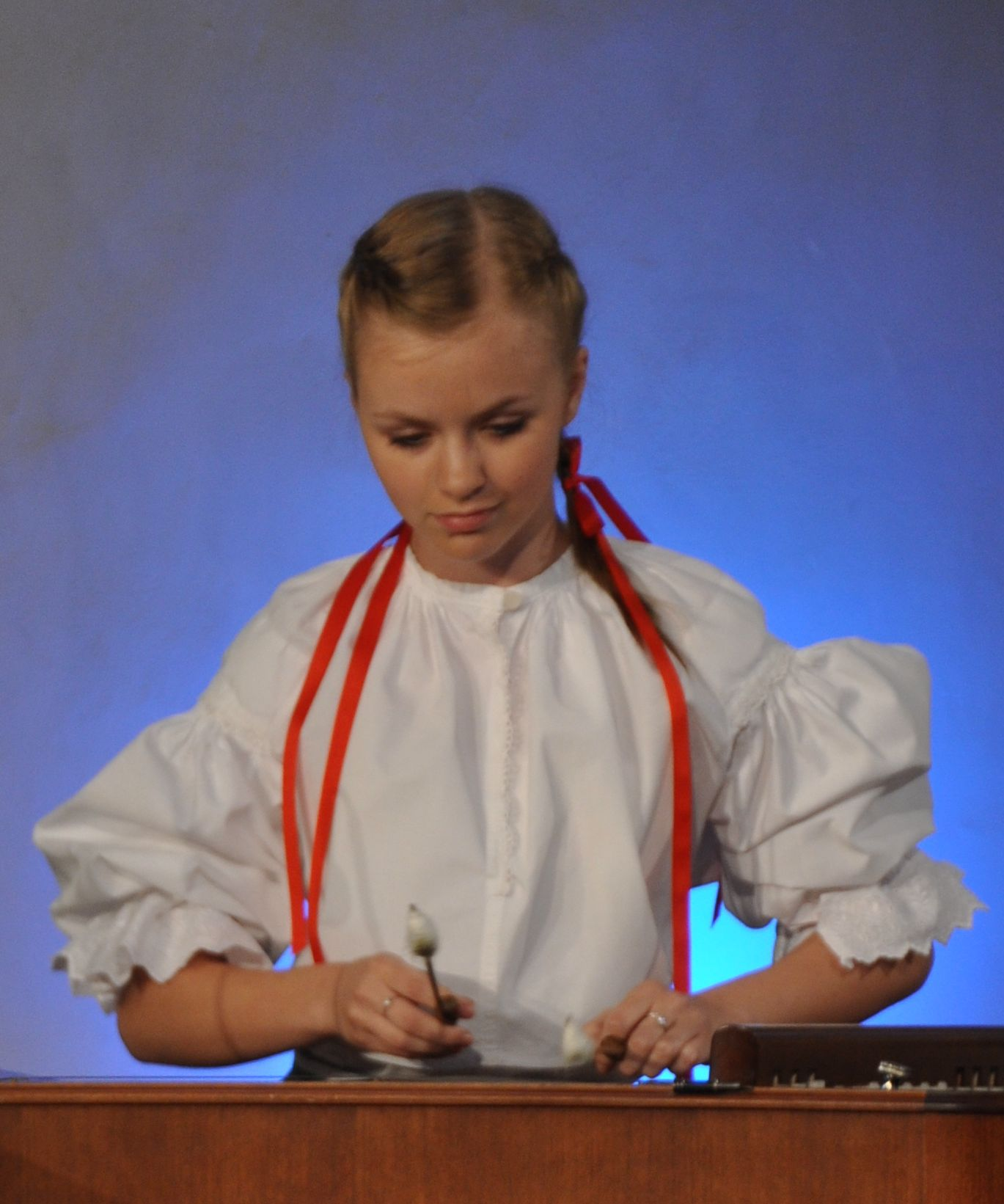 Gabriela Jílková